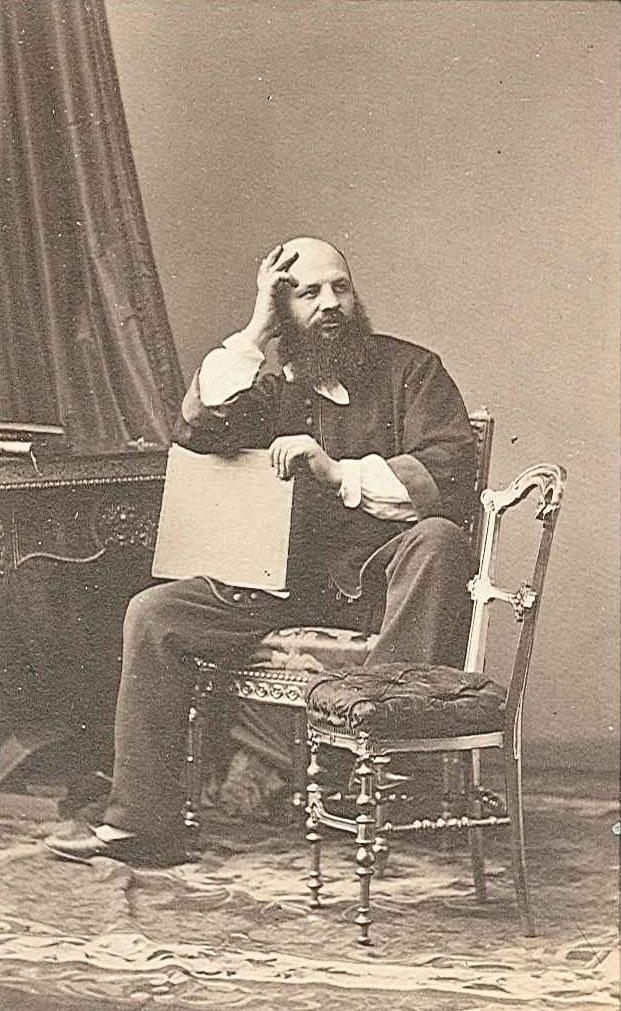 Charles Didier (écrivain)